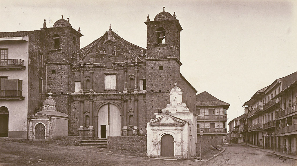 Foto de la Iglesia de la Merced de Panamá en 1875, ubicada en la Puerta de Tierra de la Ciudad de Panamá.